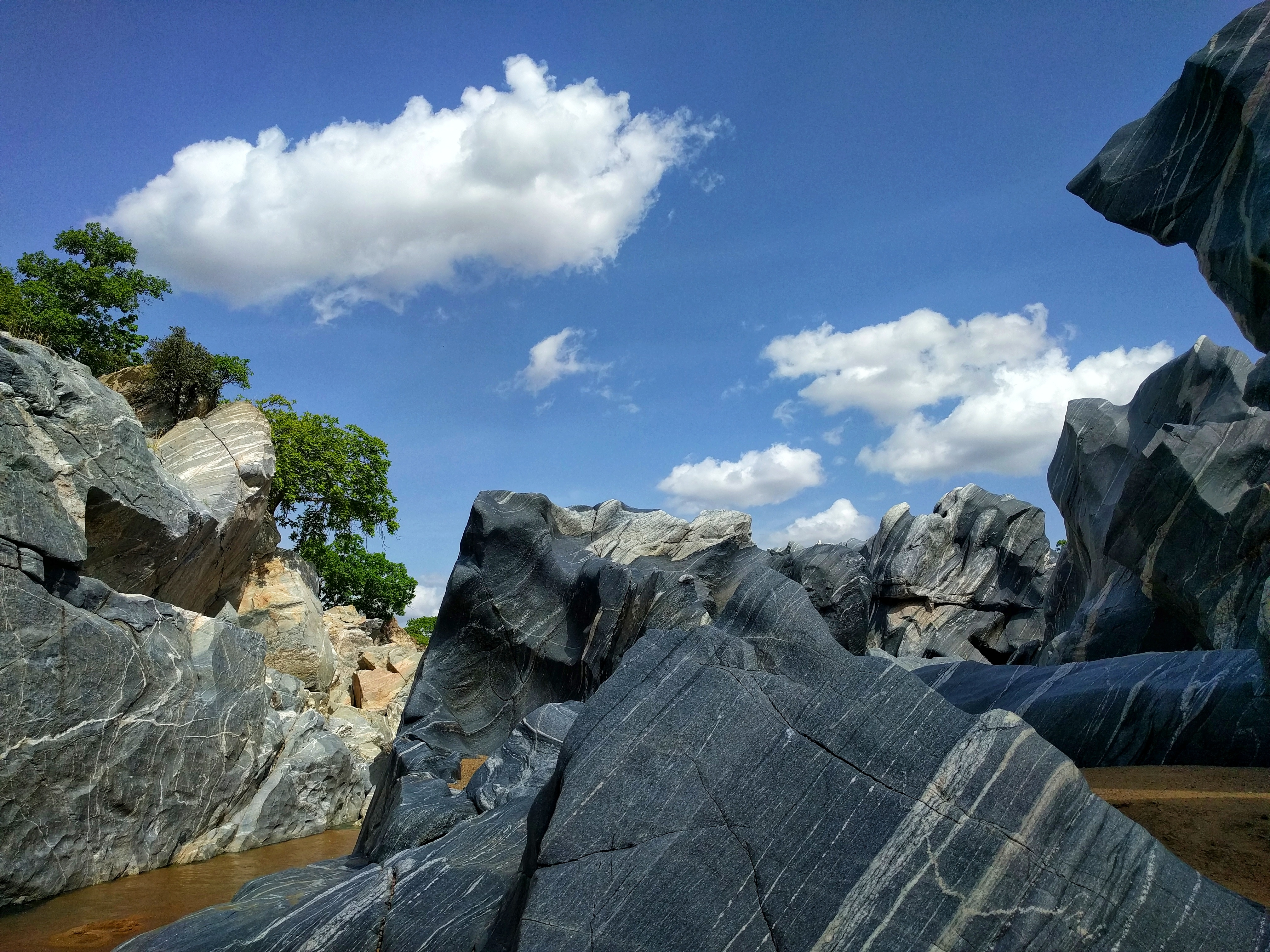 Les Gorges de Kola situé dans le Mayo-Louti à 5,2km de la ville de Guider